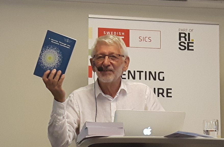 Harold Lawson giving a presentation in Linköping in 2017.